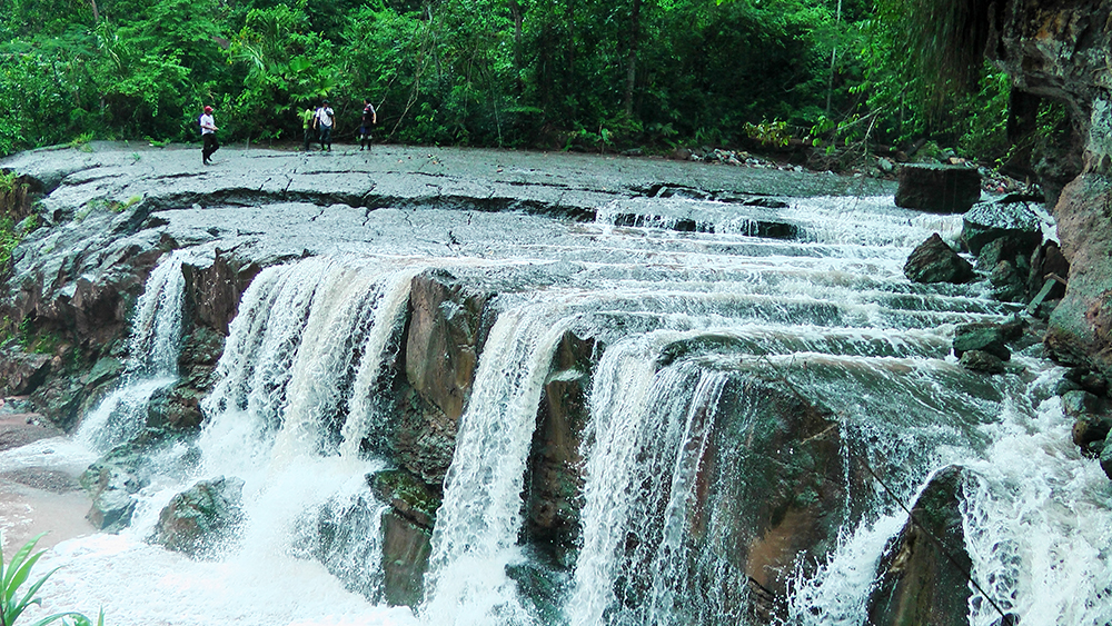 Cascada Nativa Shicshi 1